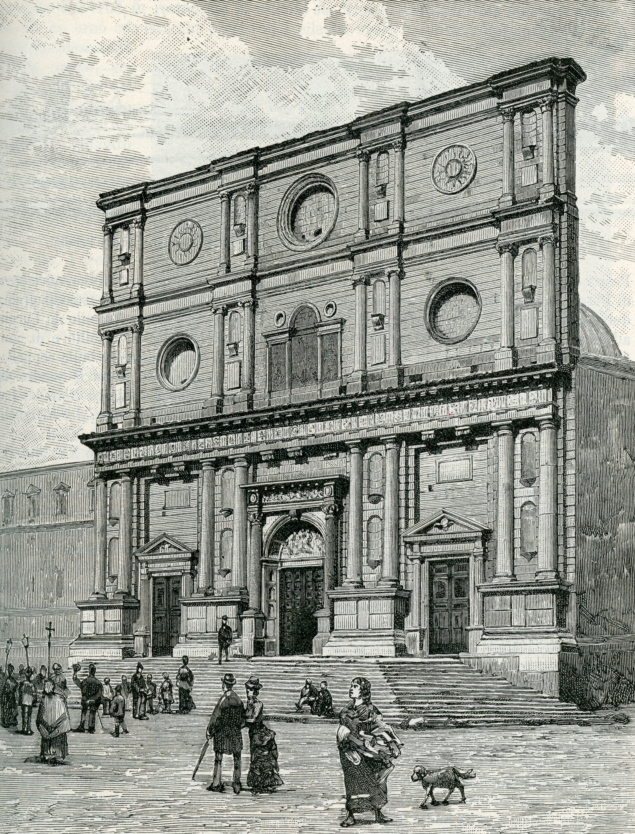 Aquila: facciata della chiesa di San Bernardino (incisore anonimo 1899).